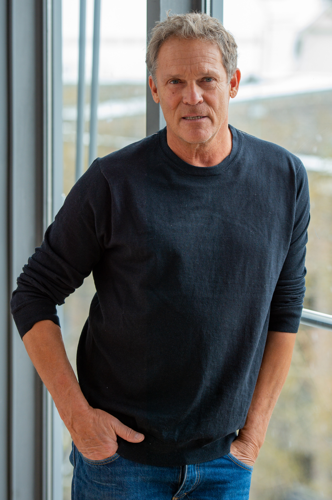 BR,Bayerischer Rundfunk,Bayerisches Fernsehen,Christian Tramitz,Filmbrunch 2019,Literaturhaus München